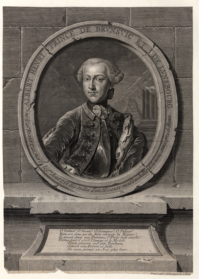 Porträt Albrecht Heinrich von Braunschweig-Lüneburg (1742-1761)